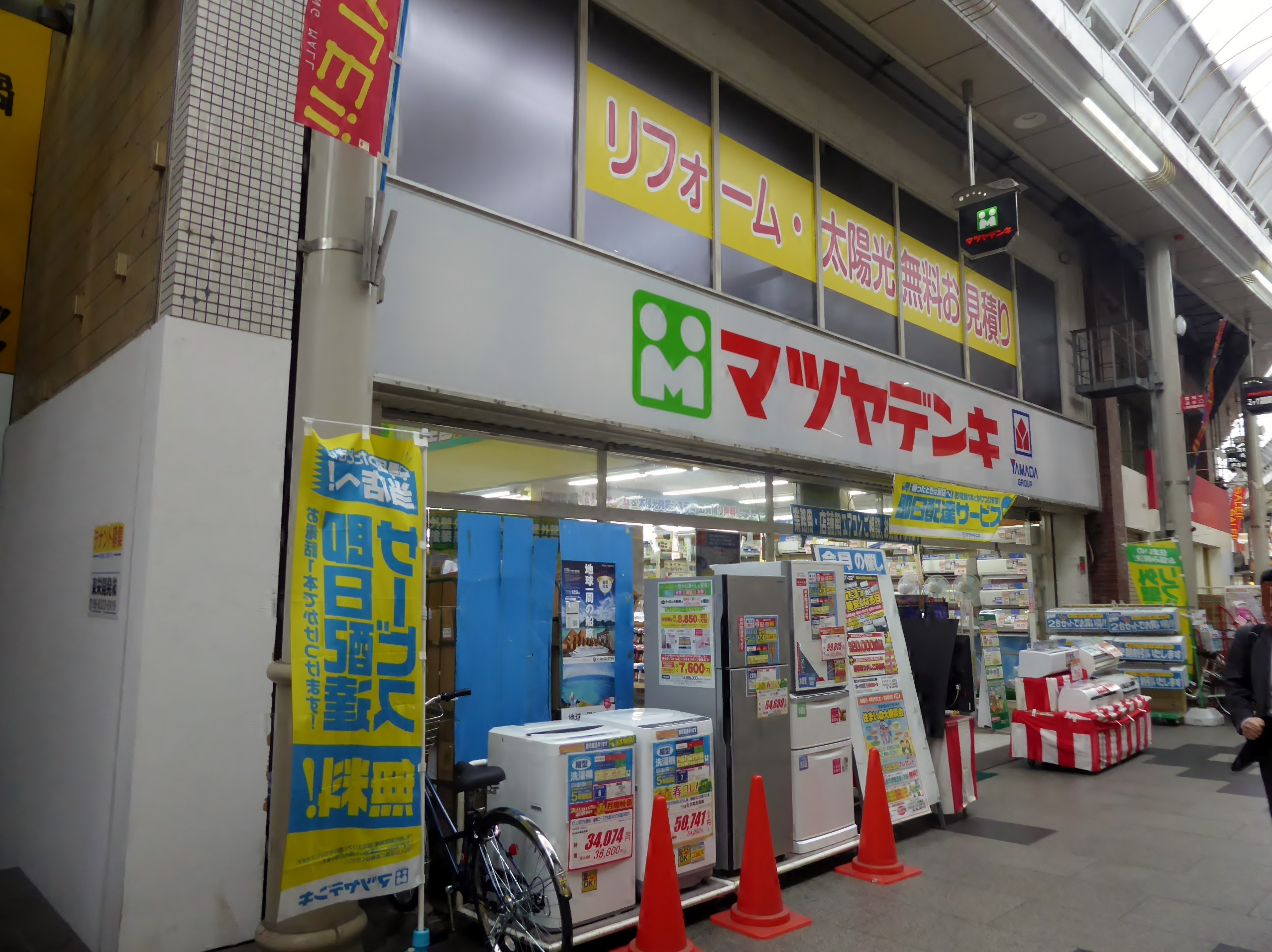 マツヤデンキ淡路店を撮影。